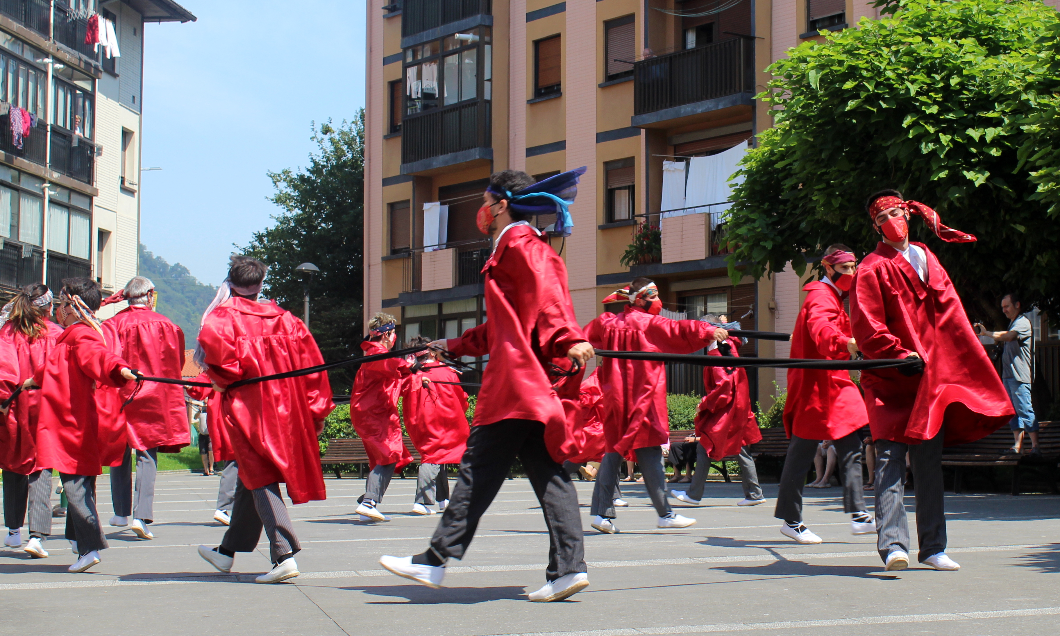 2020-06-24_Andoain-Axeri-dantza_AA-Leire-Lopetegi_9964_r